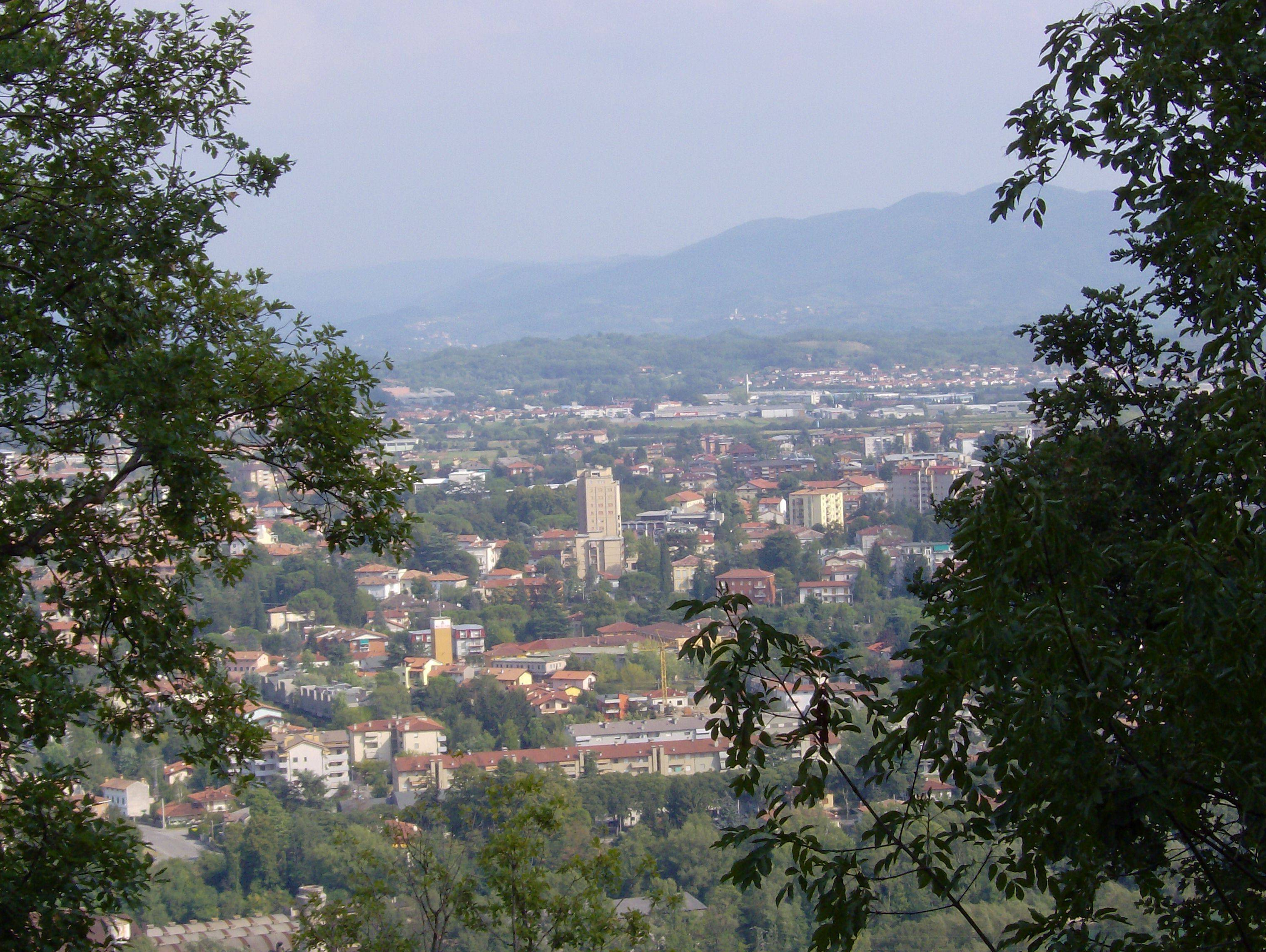 Gorizia vista E dal Monte Calvario